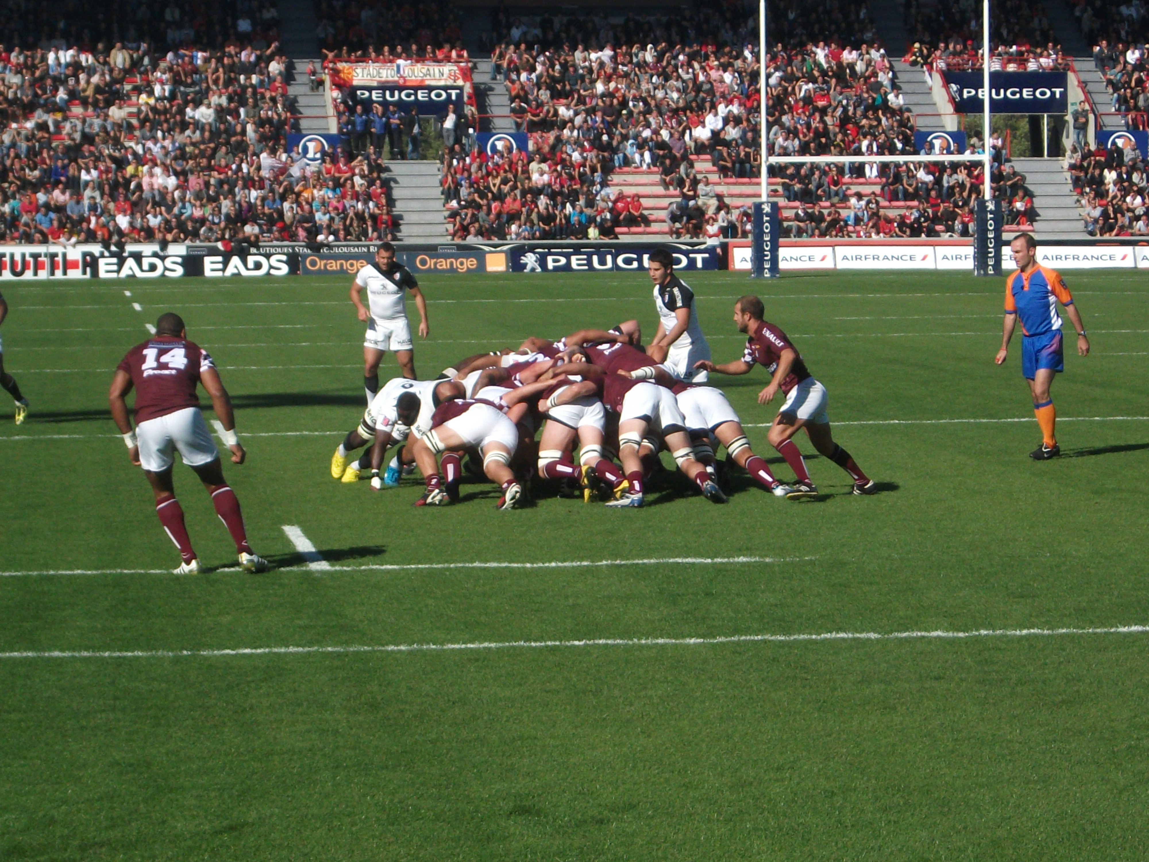 Mêlée ST UBB à Ernest Wallon